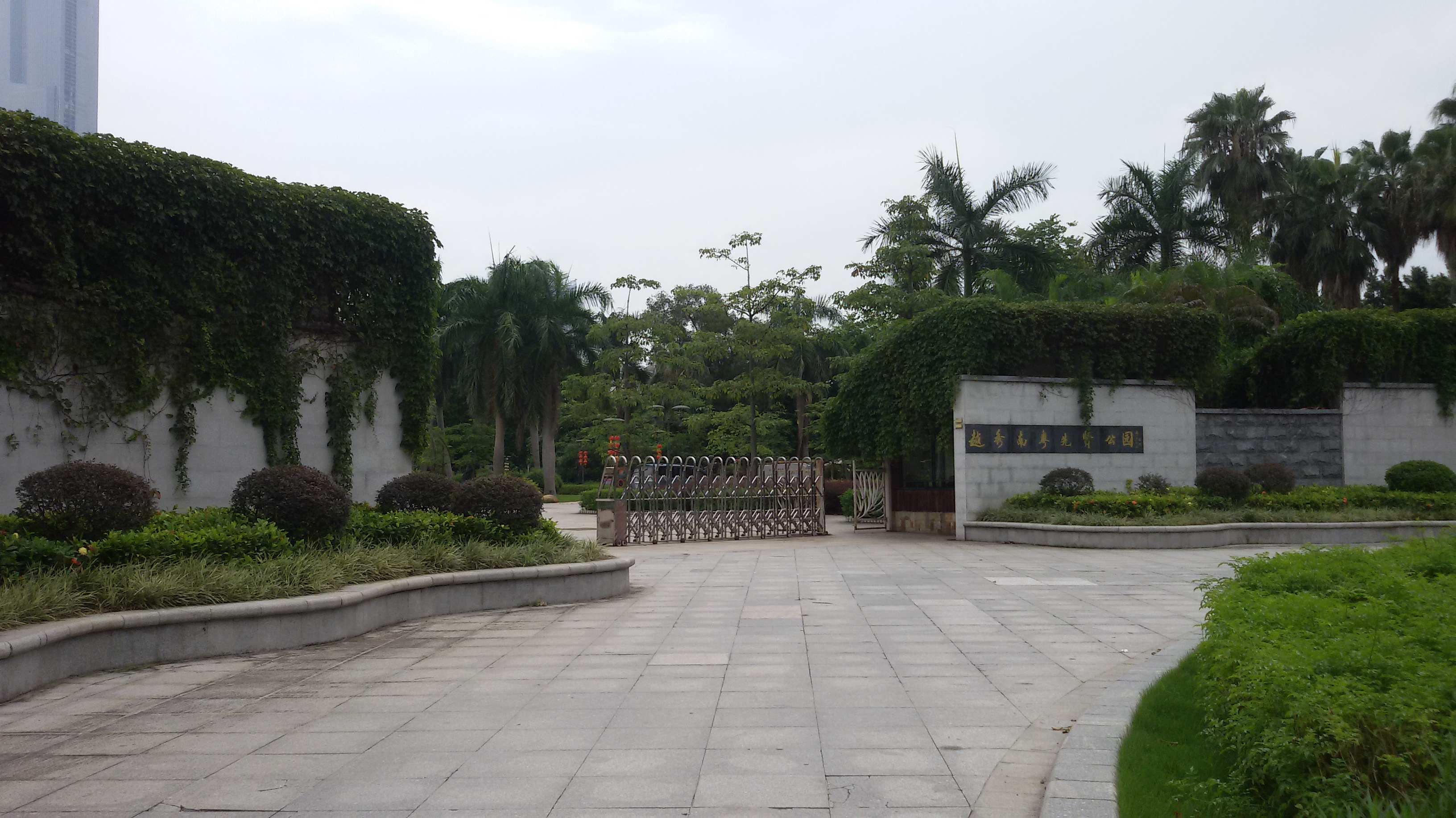 粵語: 越秀南粵先賢公園